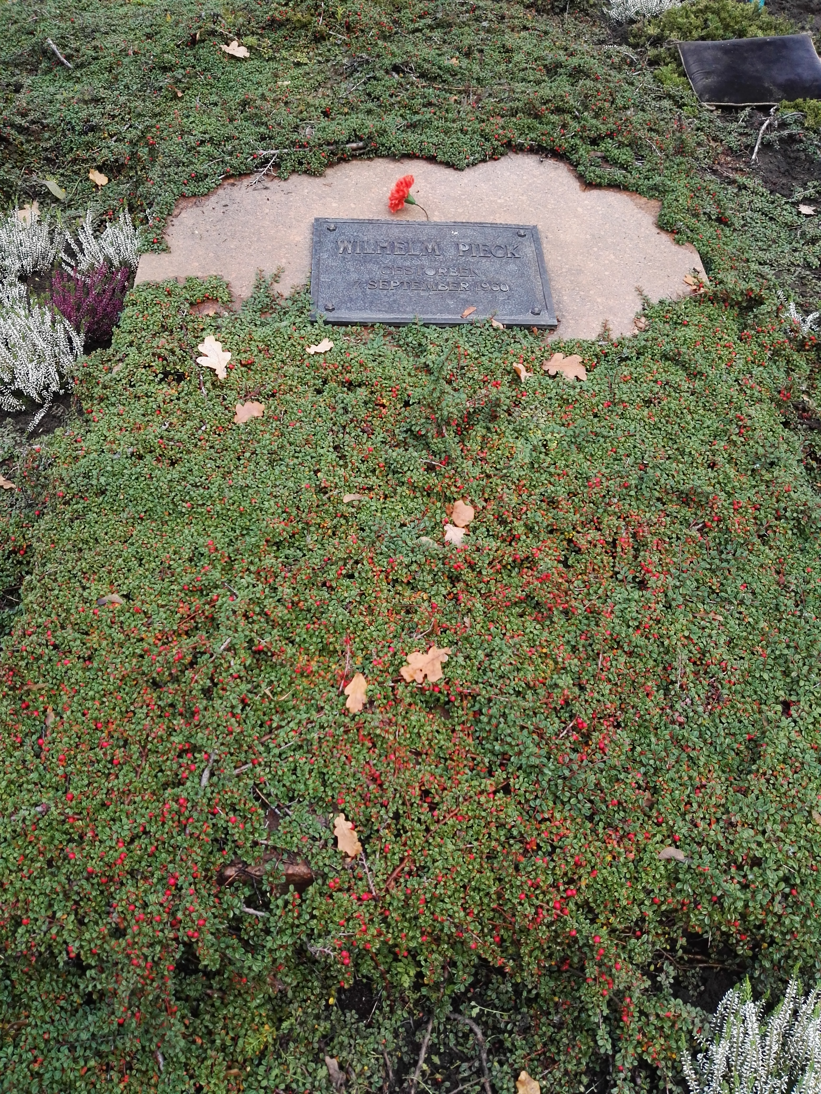 Grab von Wilhelm Pieck in der Gedenkstätte der Sozialisten auf dem Zentralfriedhof Friedrichsfelde in Berlin-Lichtenberg